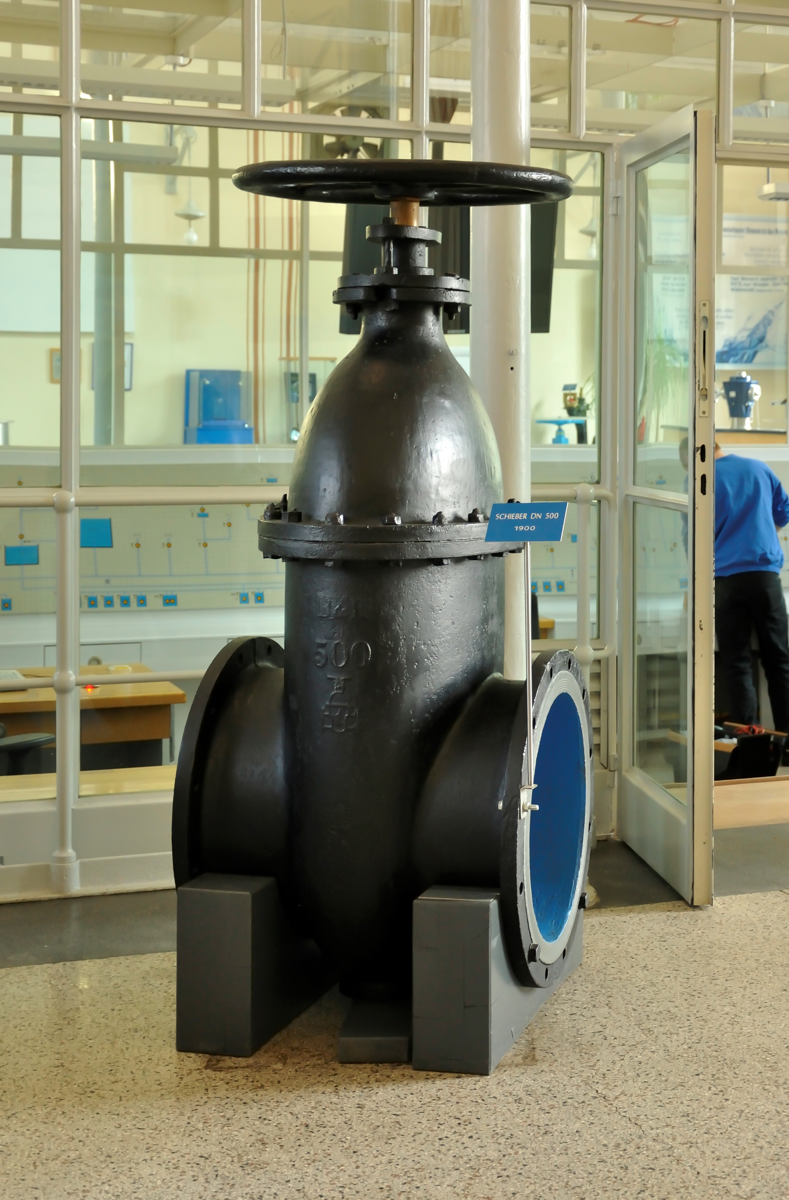 Wasserwerk der Stadt Linz. Ein Schieber aus dem Jahre 1900 in der ehemaligen Motorenhalle des Wasserwerkes Scharlinz in Linz-Kleinmünchen.